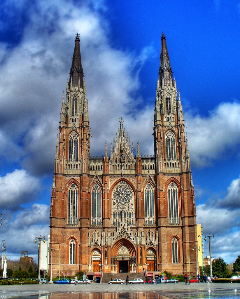 Catedral de La Plata, Buenos Aires, Argentina